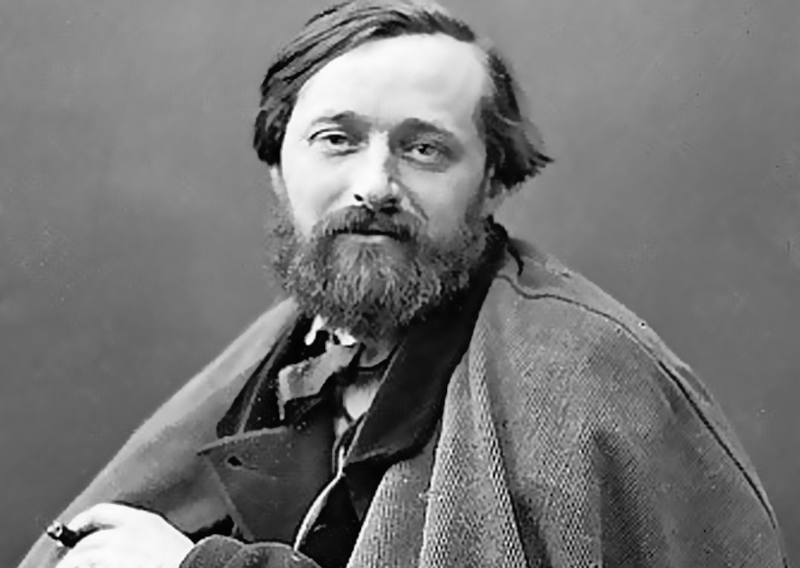 Photographie de Pierre Alexis Ponson du Terrail par Nadar au milieu du XIXe siècle